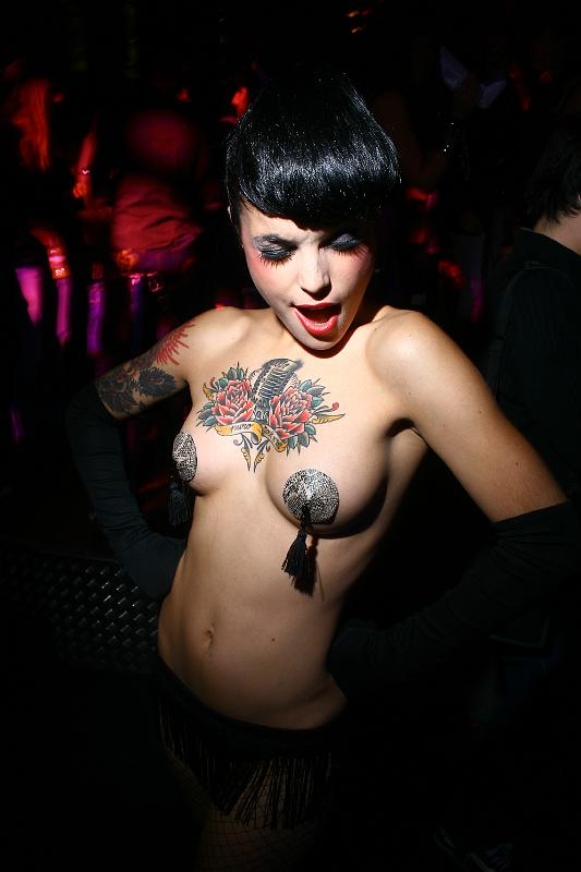 nice tattoo